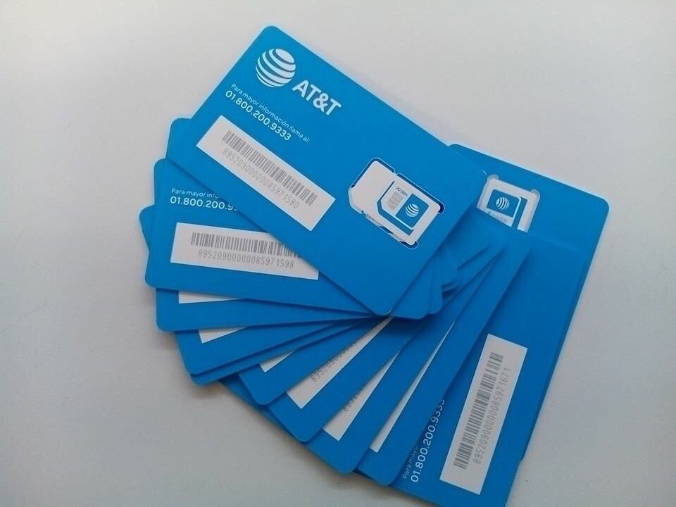 SIMS de AT&T en México